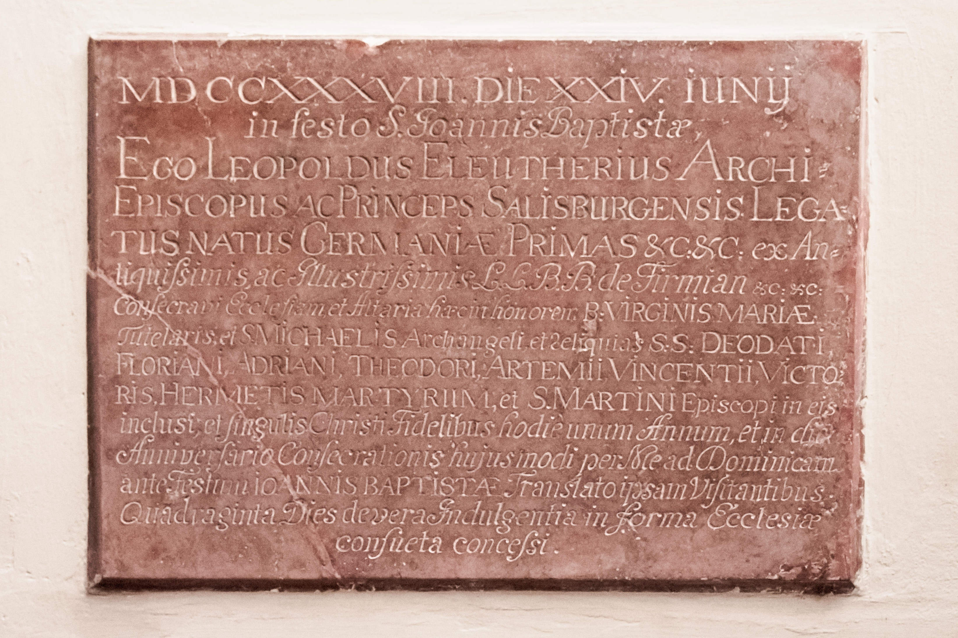 Gedenktafel an die Weihe der Pfarrkirche Gnigl in der Stadt Salzburg am 24. Juni 1738.